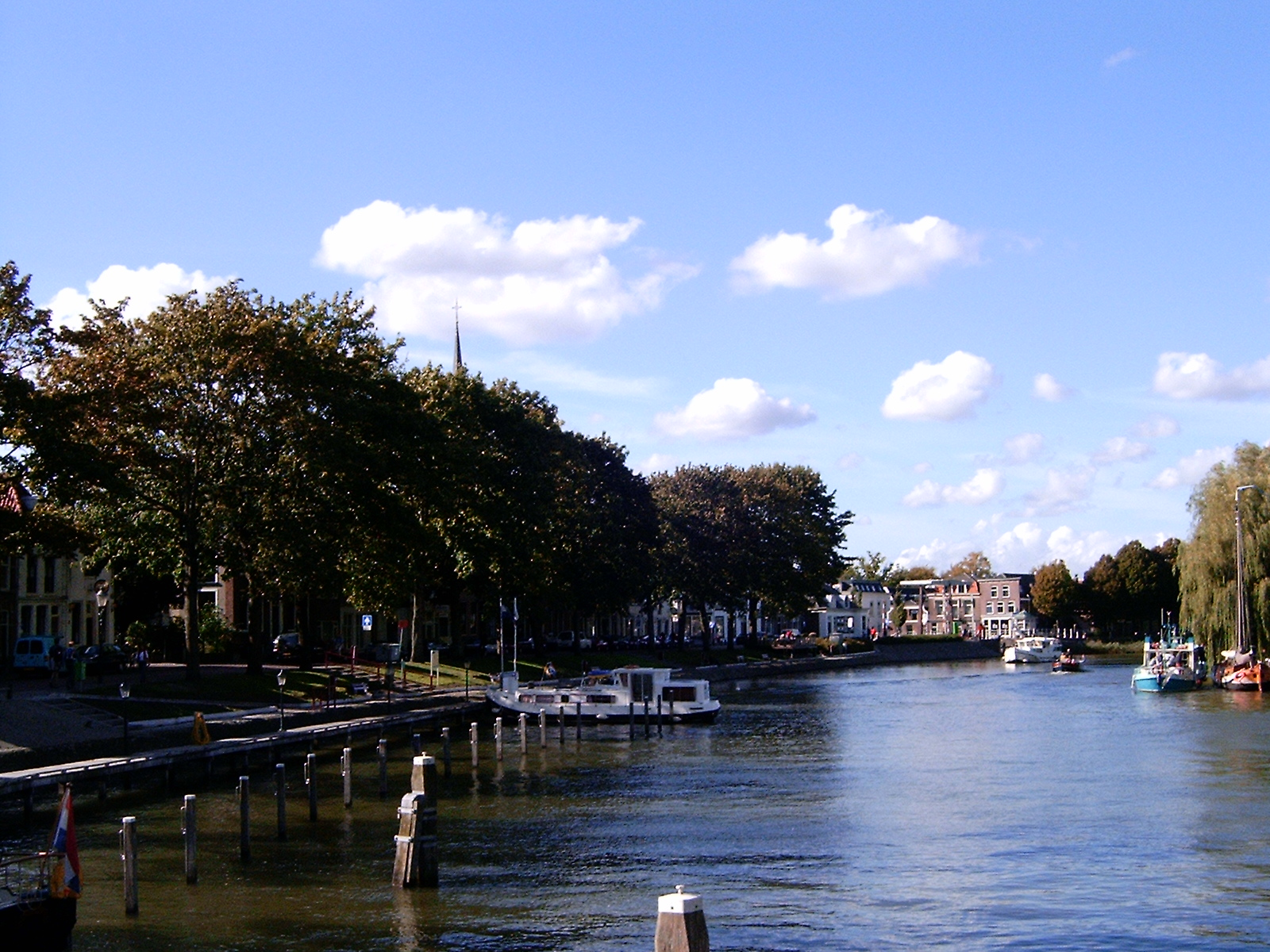 Kade van Weesp